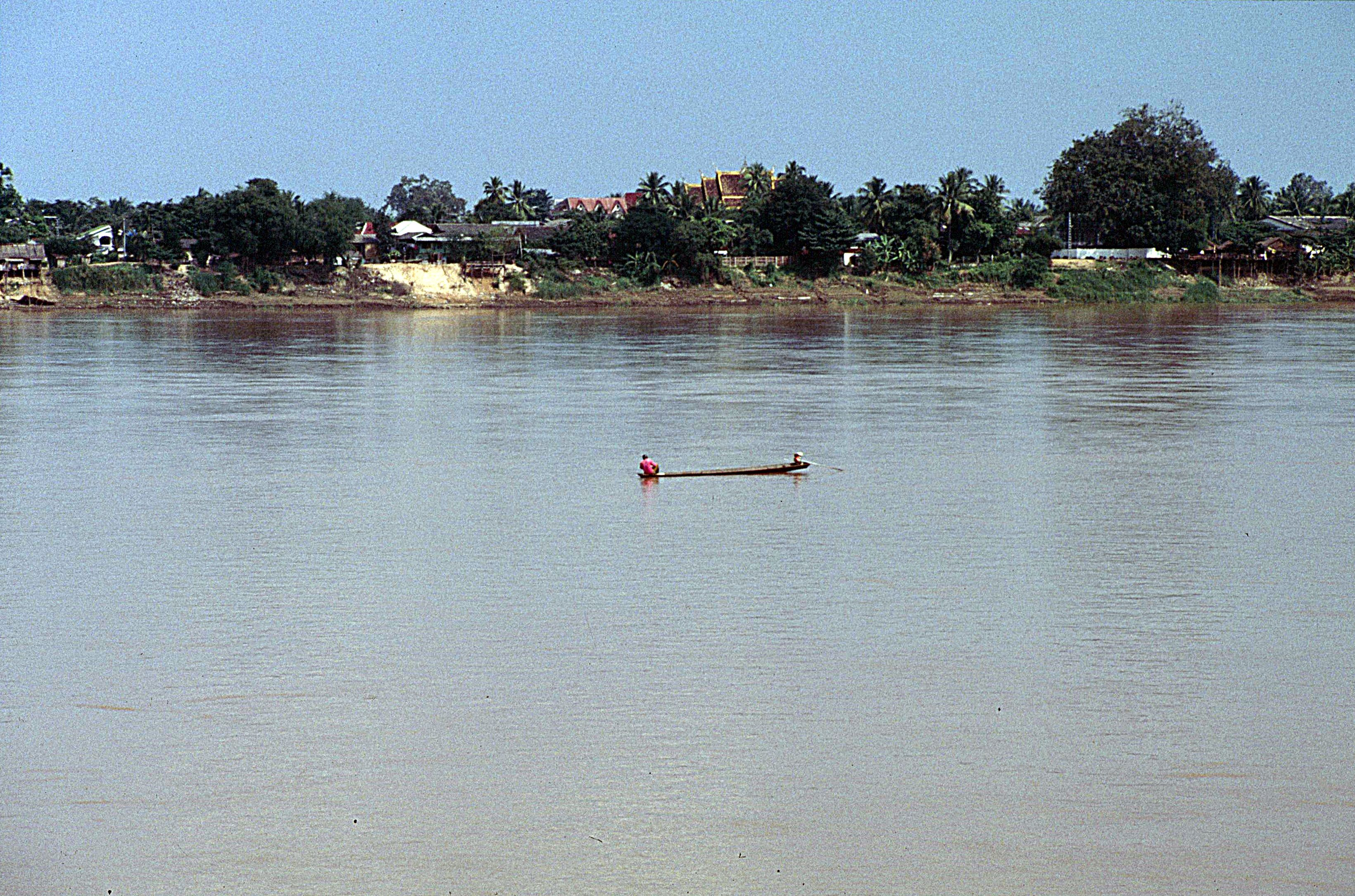 Mekong bei Nong Khai, Blick nach Vientiane